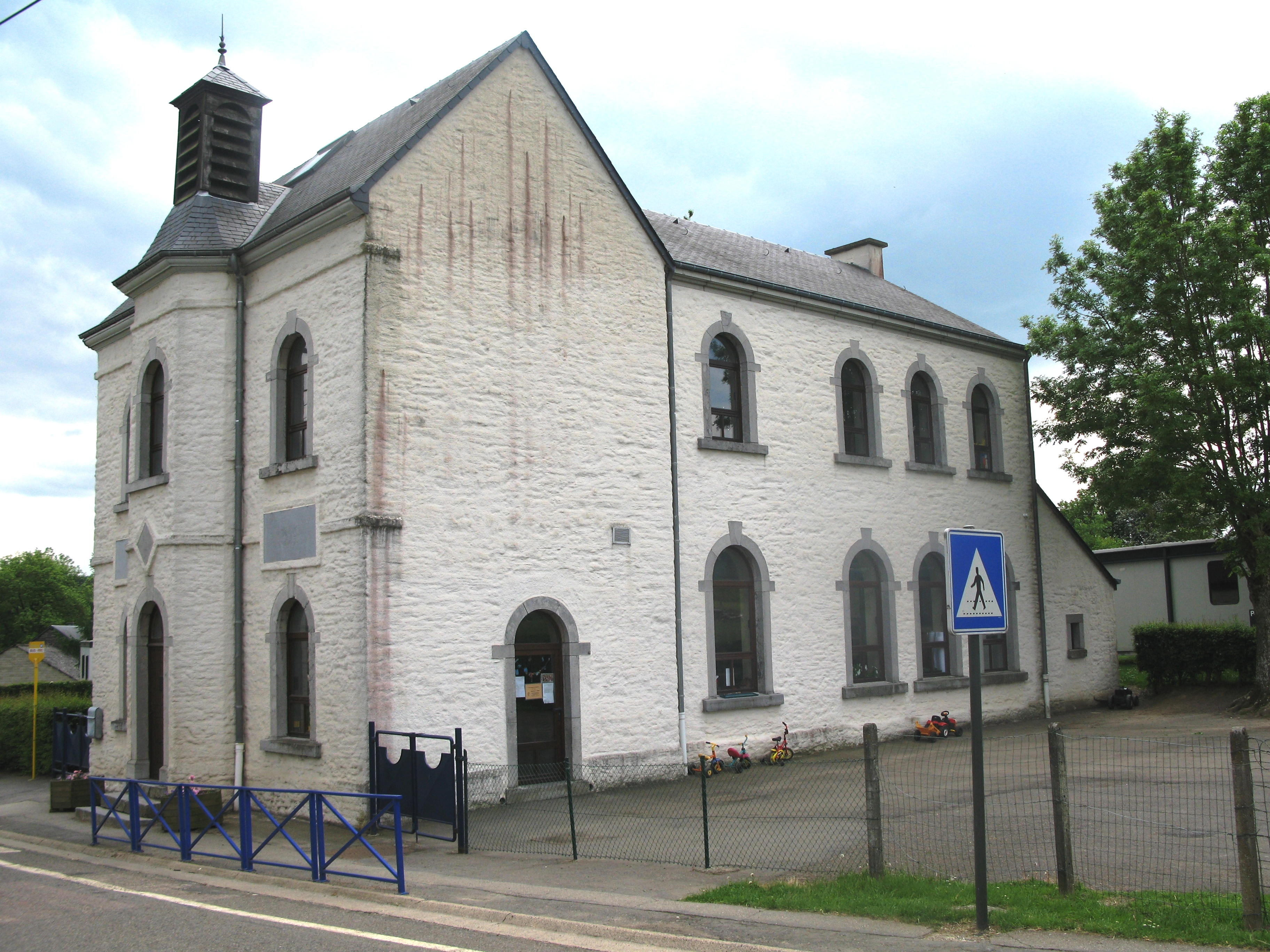 D'Schoul vun Tavigny (Belsch).